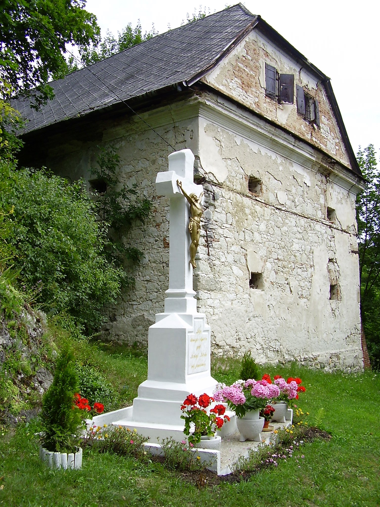 Gróf Serényi István állíttatta a kőkeresztet Dédestapolcsányban 1907. augusztus 20-án. Az 1960-as évek elején a keresztet áthelyezték a templomdobra felvezető gyalogút mellé. 2017-ben a kőkeresztet felújították, környékét rendezték. A feszület hátterében az egykori magtár látható.